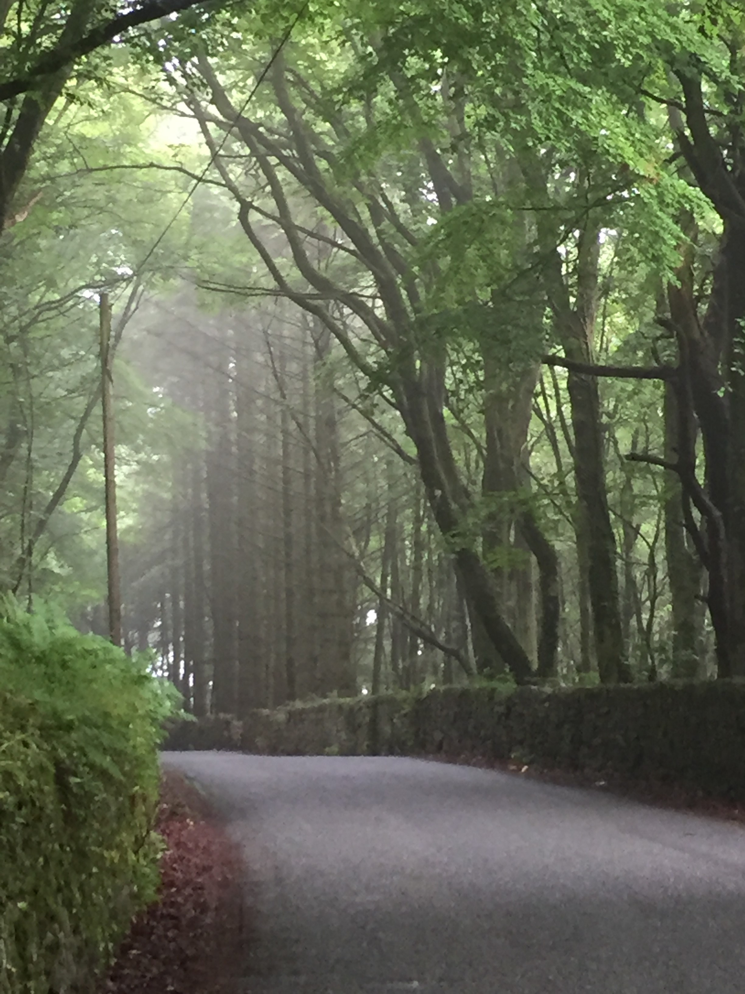 Lon Trigwm, Beudy Bigin, Tudweiliog.